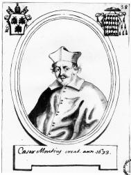 Ritratto del Cardinale Cesare Monti, arcivescovo di Milano.